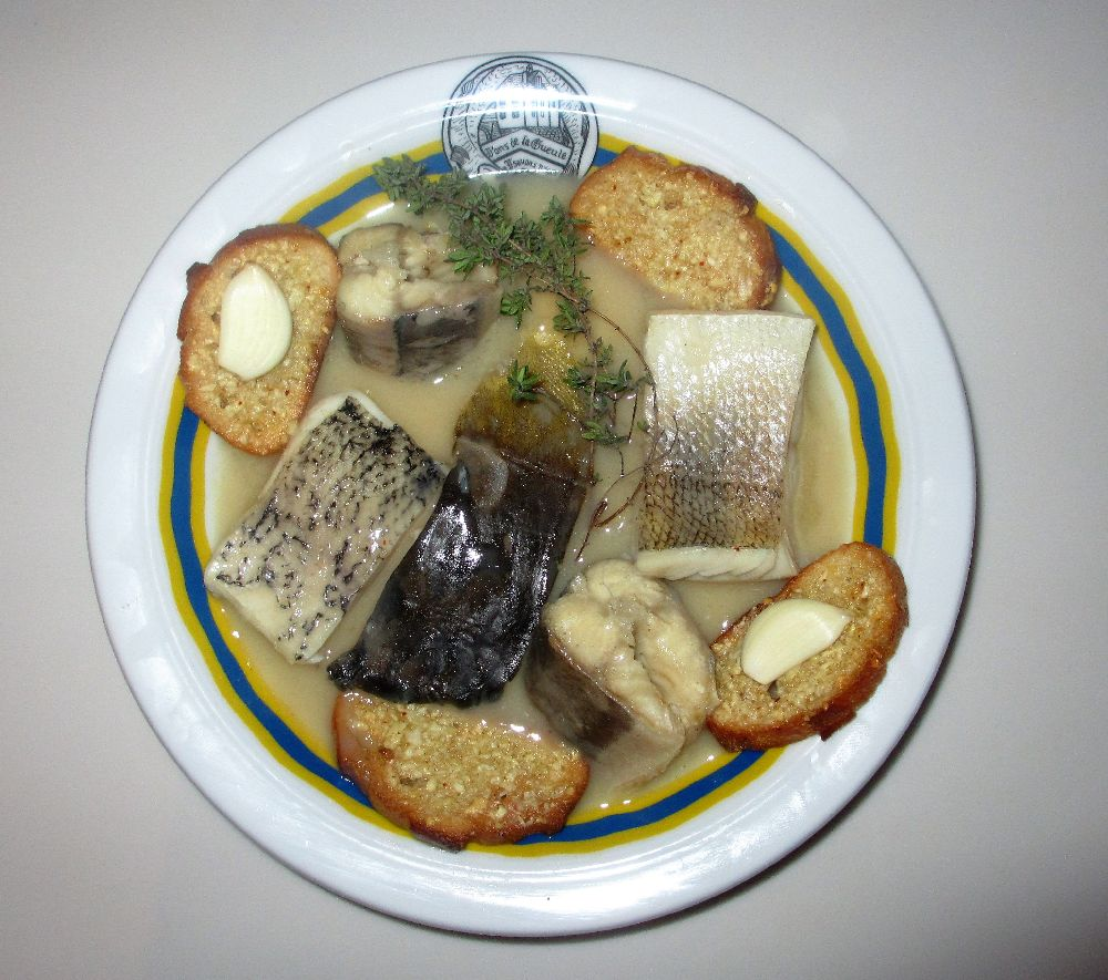 Plat de pôchouse Verdunoise